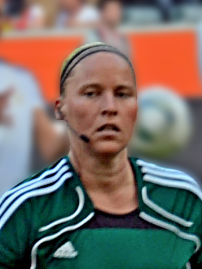 Die finnische Schiedsrichter Kirsi Heikkinen während des Spiels Frankreich - Deutschland der Fußball-Weltmeisterschaft der Frauen am 5. Juli 2011 im Stadion im Borussia-Park in Mönchengladbach